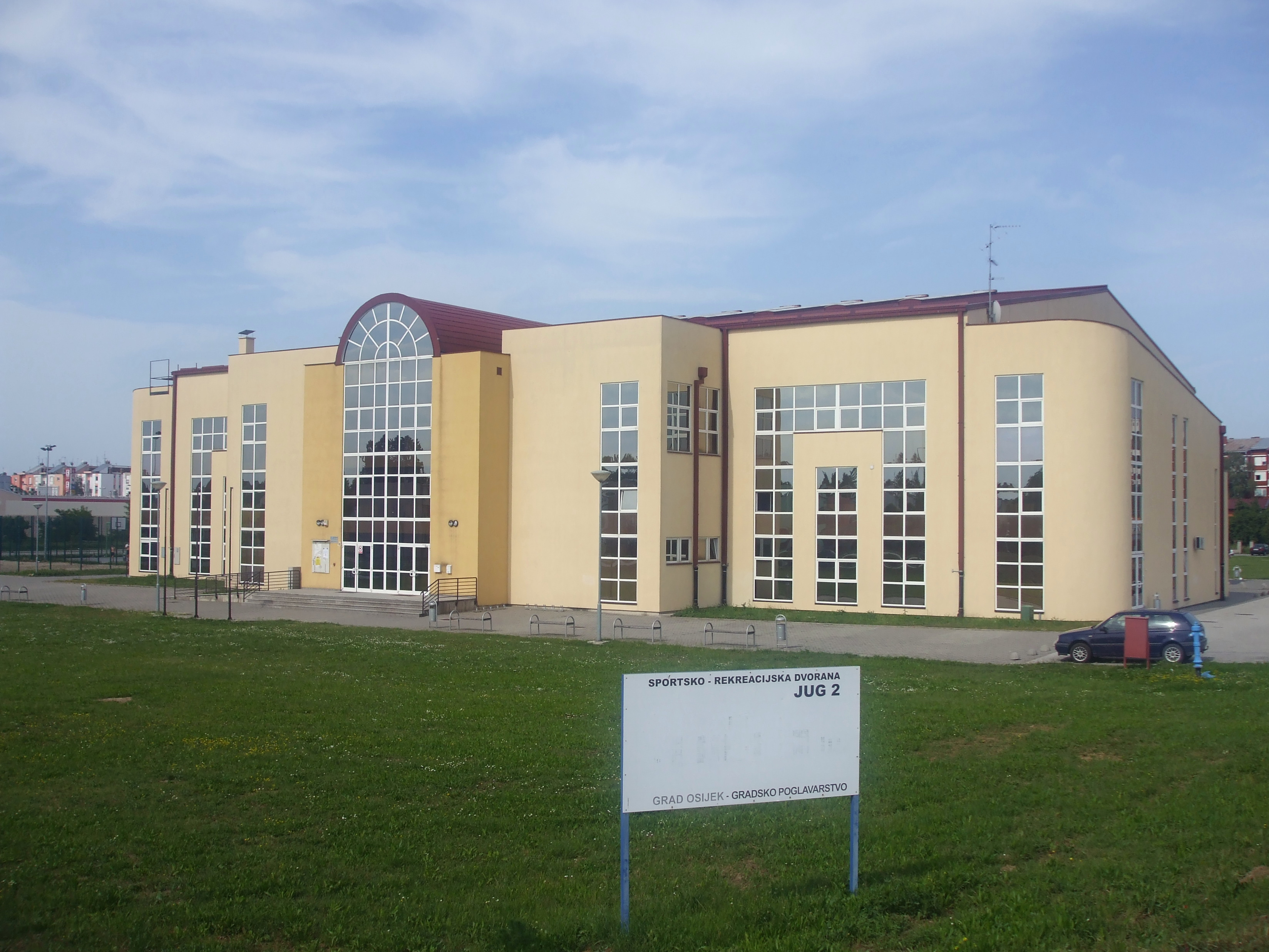 Športsko-rekreacijska dvorana Jug 2, Osijek